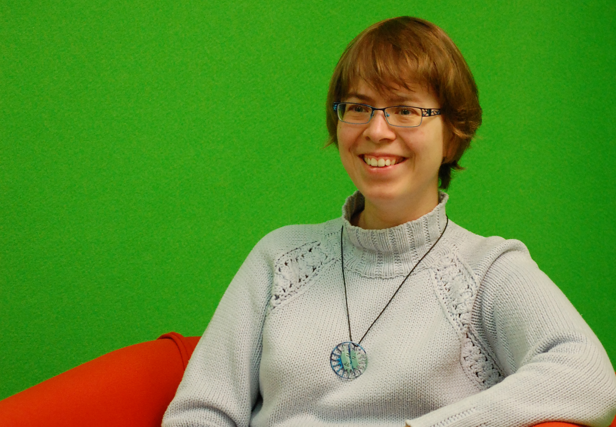 Yaël Nazé, astrophysicienne, à l'Espace des sciences le 16 octobre 2012